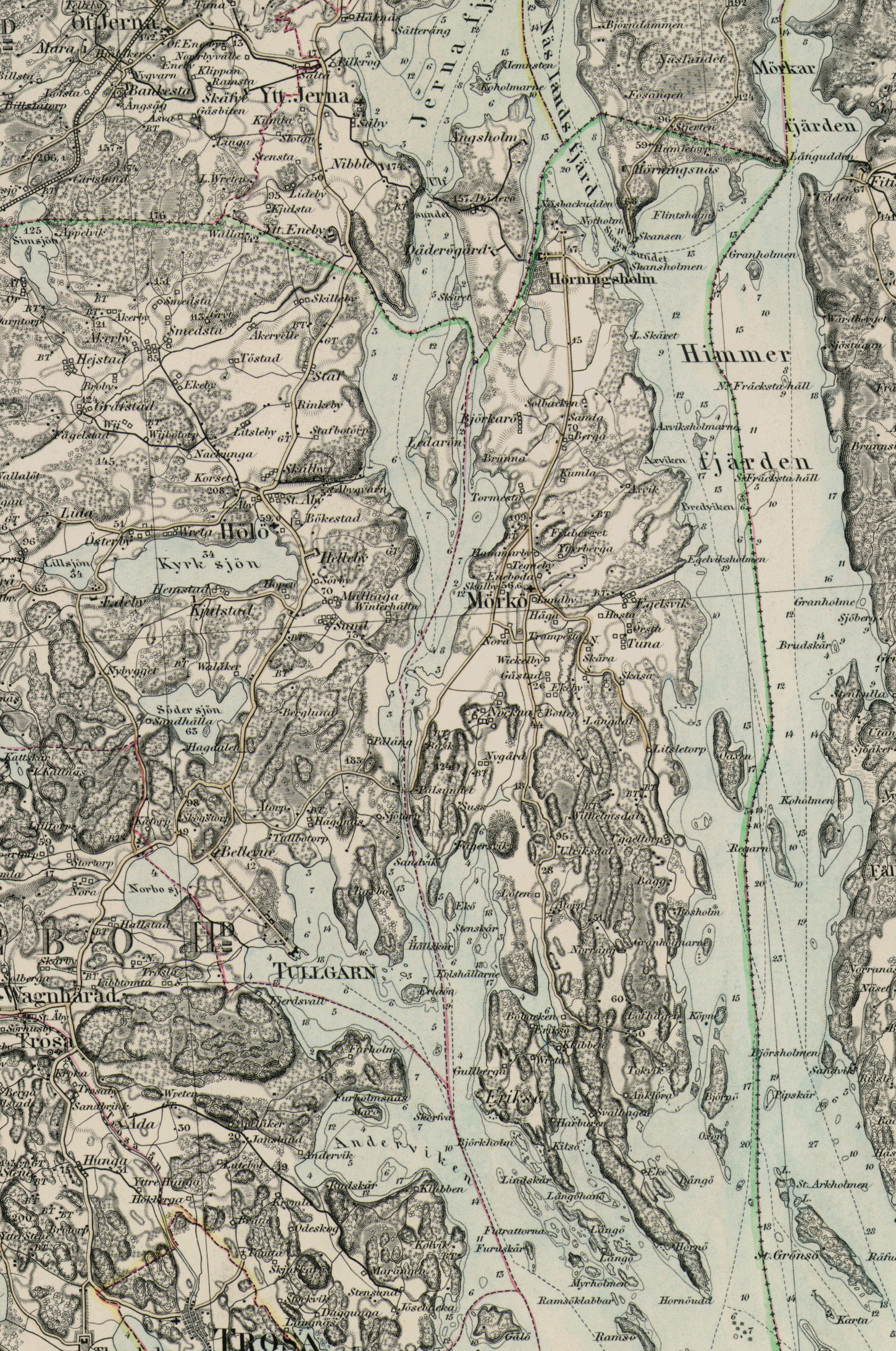 Utsnitt ur Generalstabskarta Trosa 1873 kartlagd 1854-1867